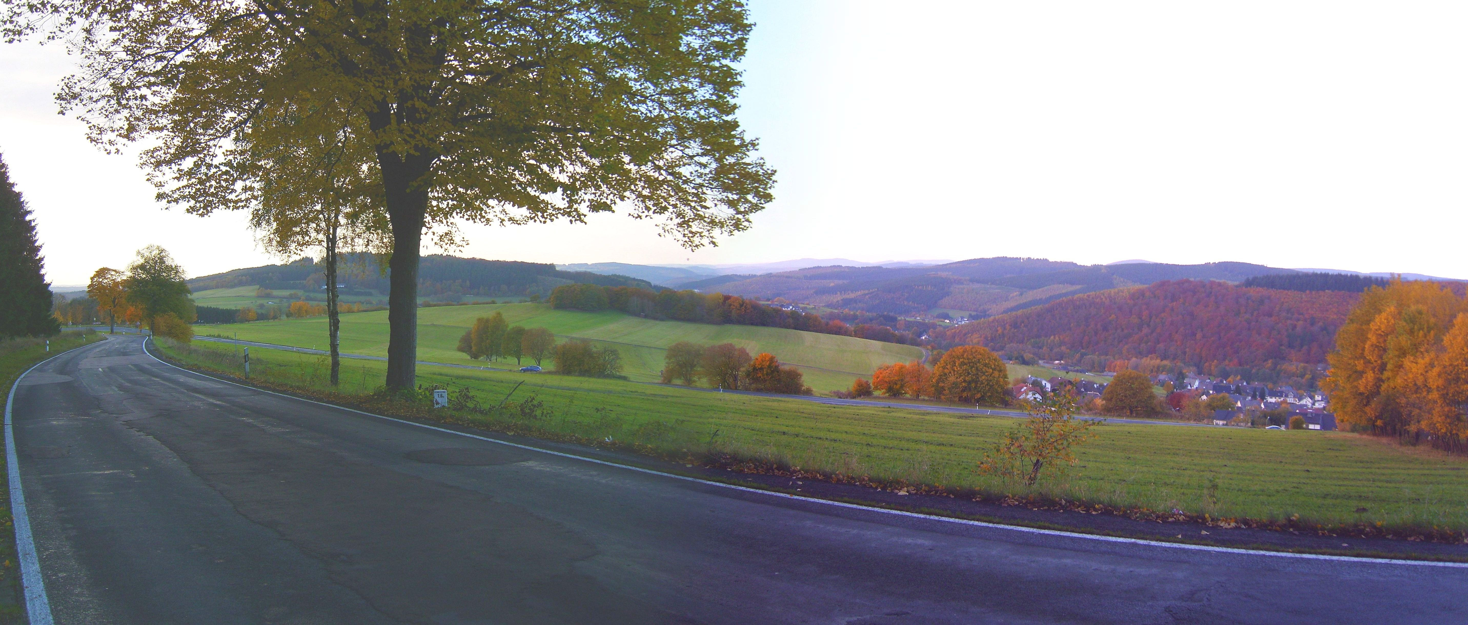 Siegerland-Landschaft von der Serpentine am Nordwestrand der Überquerung der Haincher Höhe im Südwesten des Rothaargebirges aus mit dem namensgebenden Ort Hainchen im Vordergrund. In zweiter Reihe die um eine Höhenstufe höheren Berge des westlichen Rothaargebirges: In der Mitte die Doppelkuppe aus Kindelsberg (618 m hoch, 21,6 km entfernt) und Martinshardt (616 m; 20,6 km), nach rechts übergehend in die Südwestkuppe (605 m; 24,0 km) und den eigentlichen Gipfel des Hohen Waldes (23,7 km; 655 m); halbrechts herauslugend die Alte Burg (633 m, Siegerländer Rothaar-Vorhöhen), rechts die Randhöhen des Massivs um die Oberste Henn (676 m). Vgl. auch Deutschle-Panoramen.